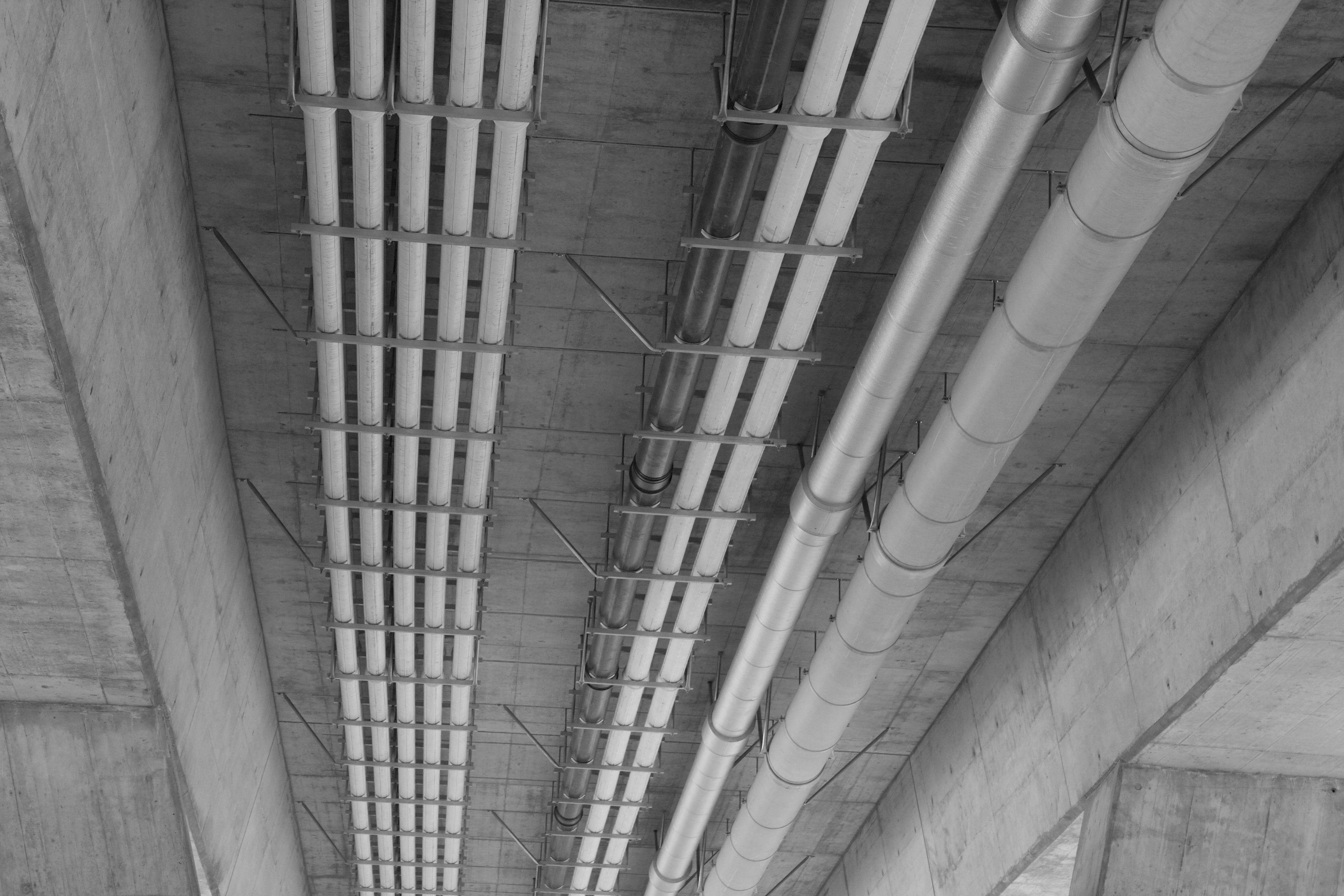 Werkleitungen unter der Autobahnbrücke bei Choindez